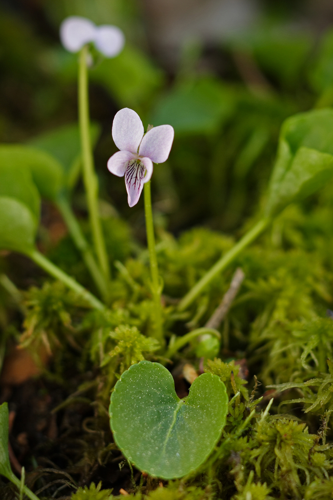 Marsh Violet (Viola palustris)